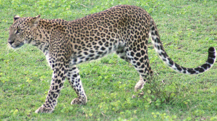 Sri Lanka Leopard (Panthera pardus kotiya)